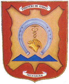 Escudo Purepero